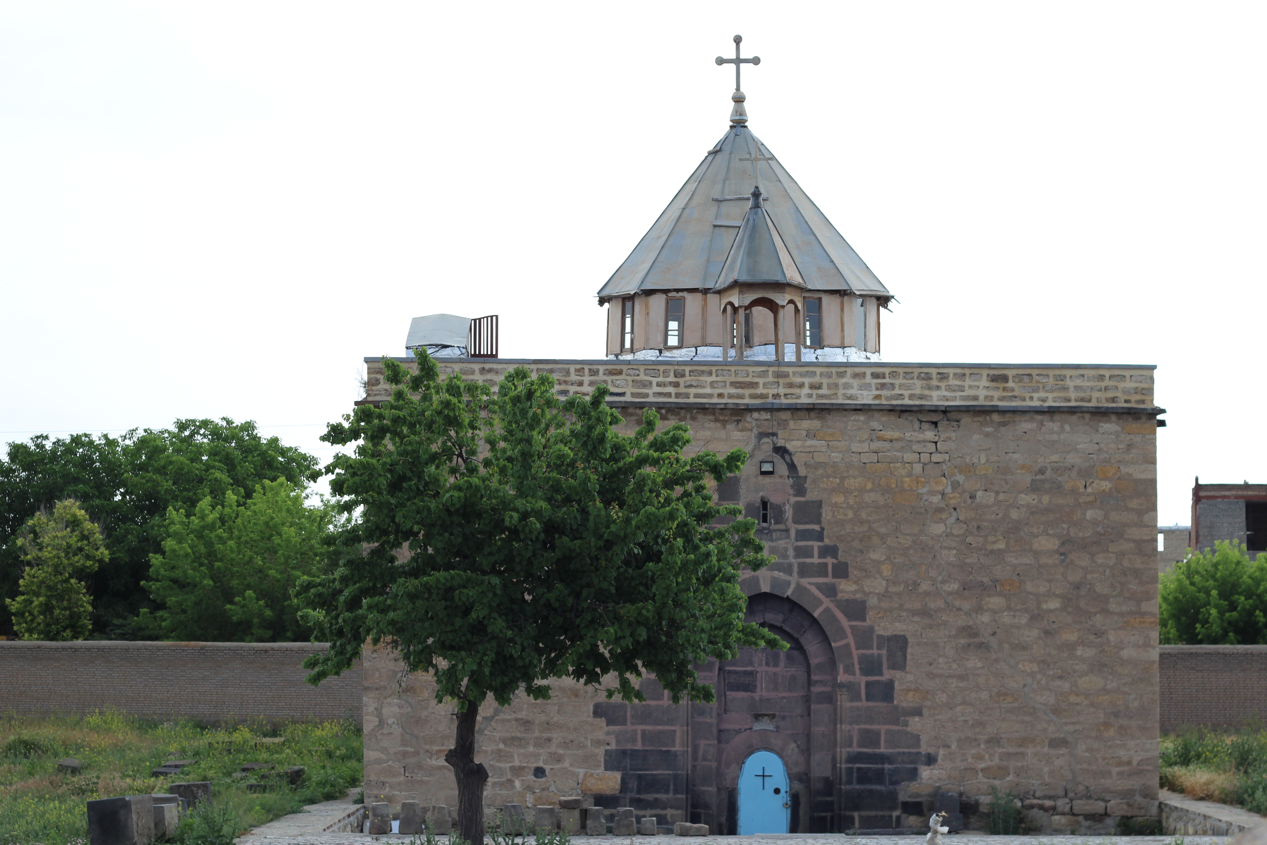 کلیسای گئورگ مقدس (هفتوان)